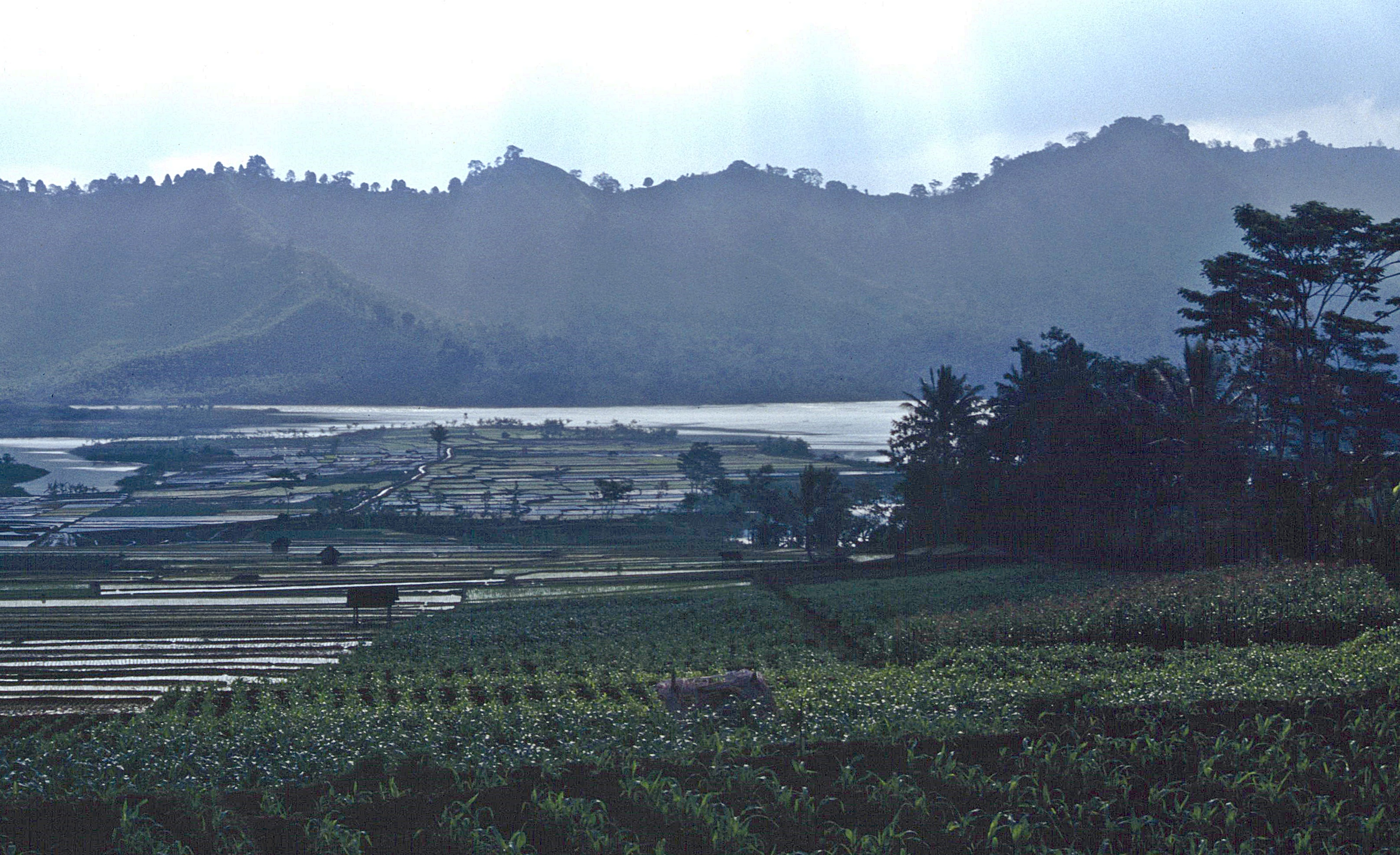 Lake Selorejo bei Ngantang